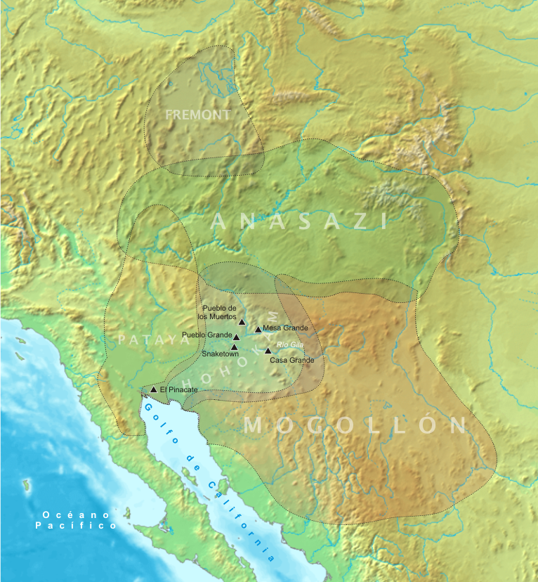 Localización de Oasisamérica